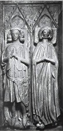 Frühgotischer Steinepitaph. Grabmal von Graf Heinrich von Arnsberg und seiner Frau Ermengard.